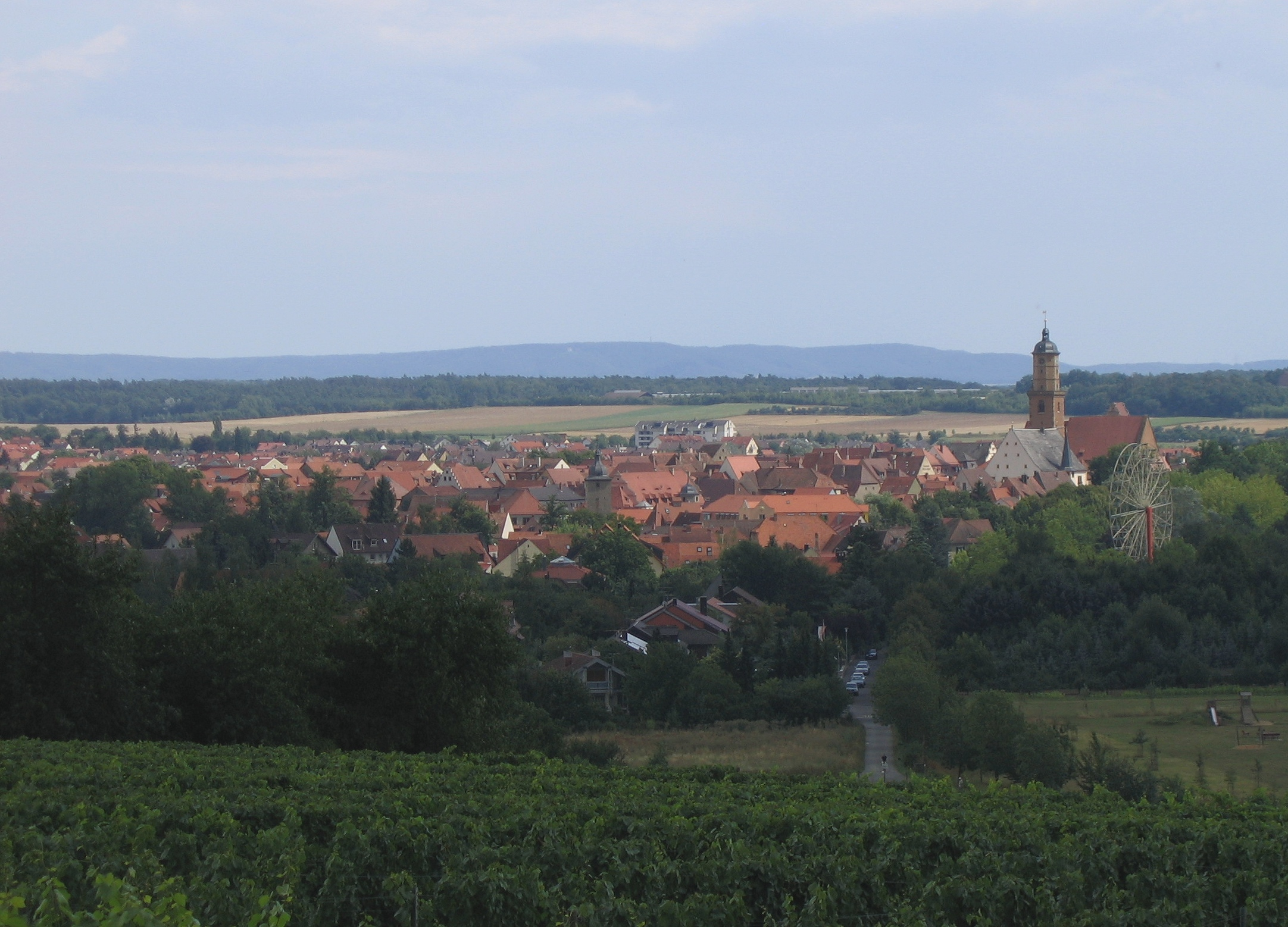 Volkach, Bavaria, Germany